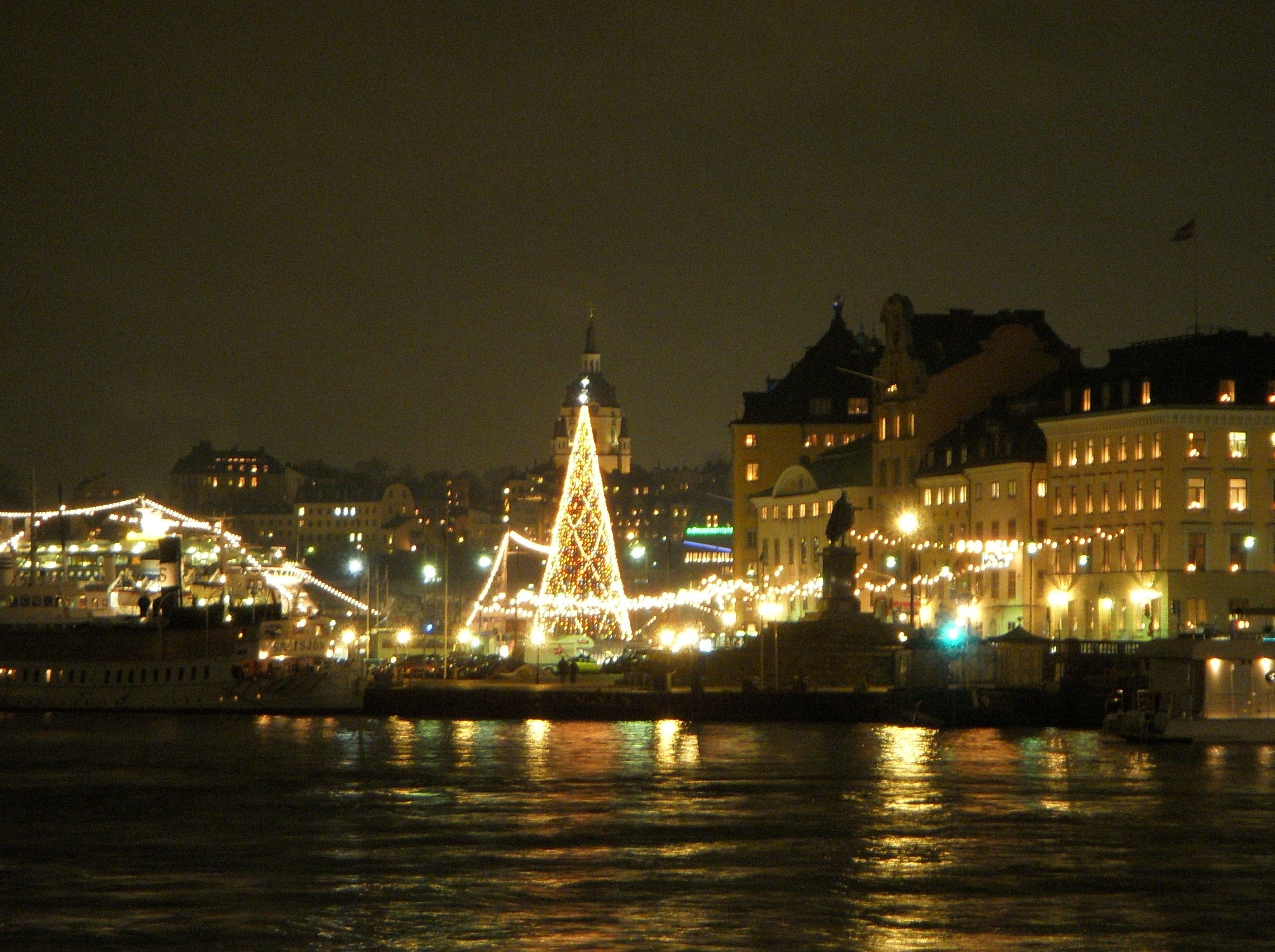 Blick över Gamla stan, 1:a advent 2008